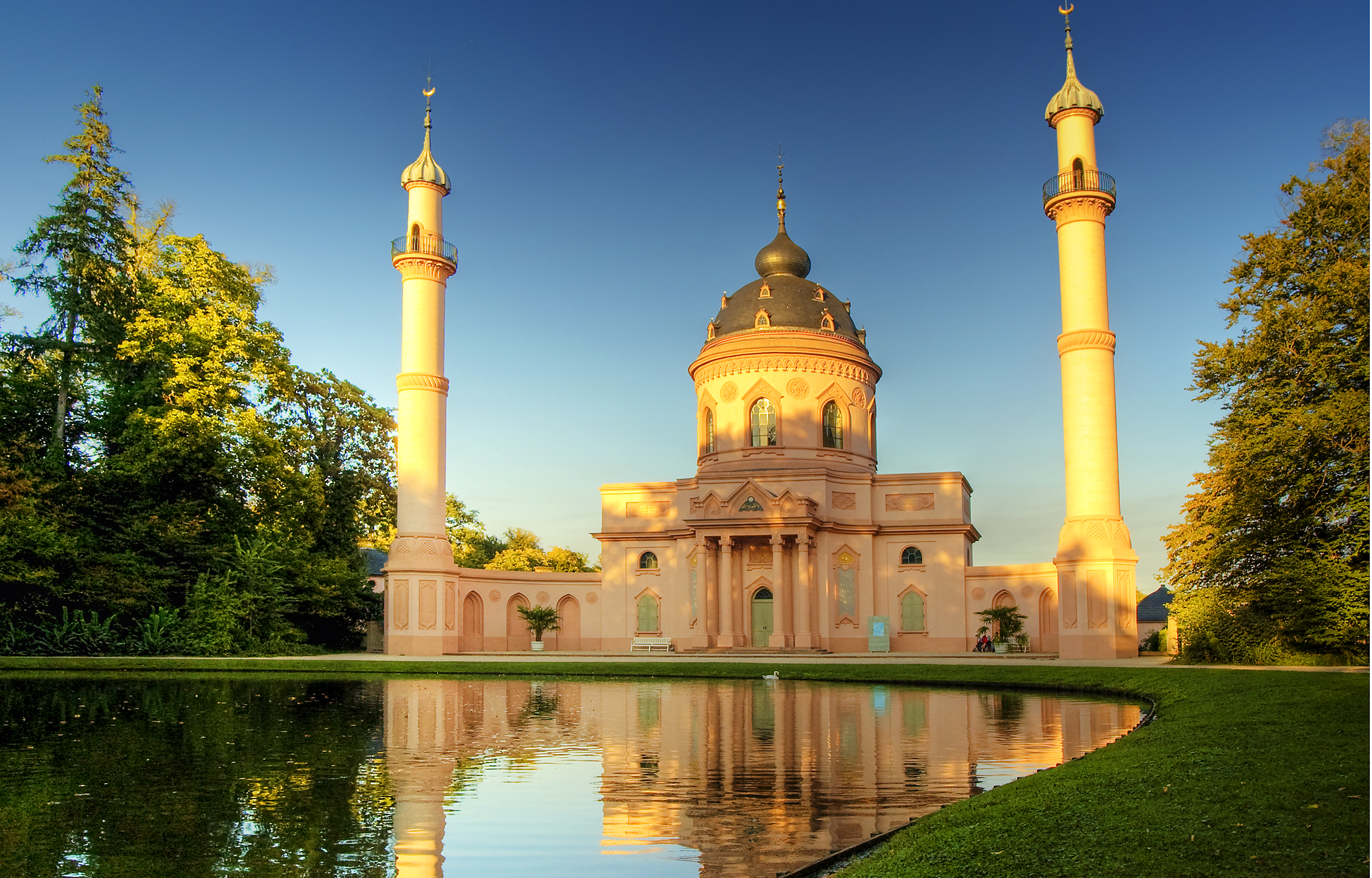 Mosque of Schwetzingen Castle